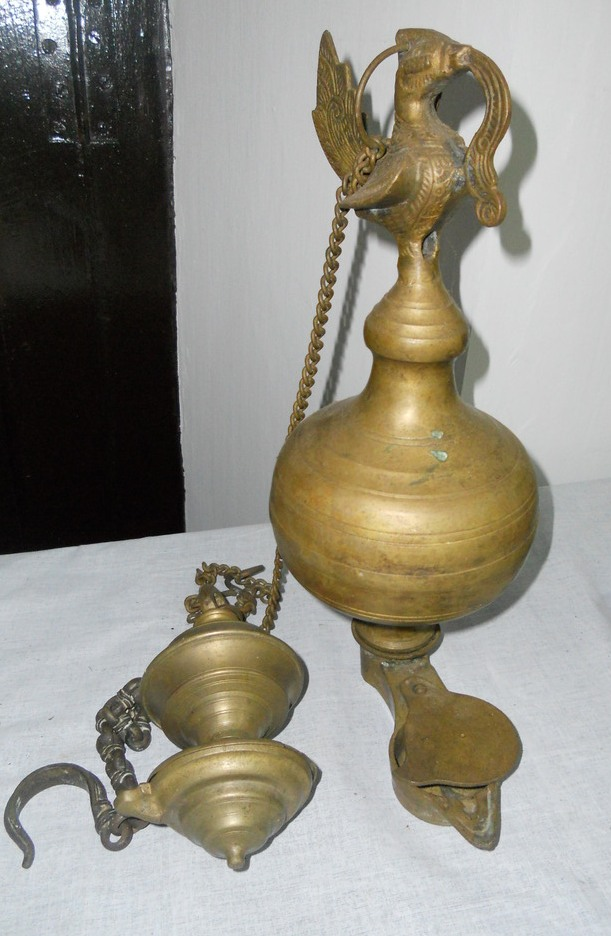 അണയാതെ സൂക്ഷിക്കപ്പെടുന്ന ദീപം, വാടാവിളക്ക്‌